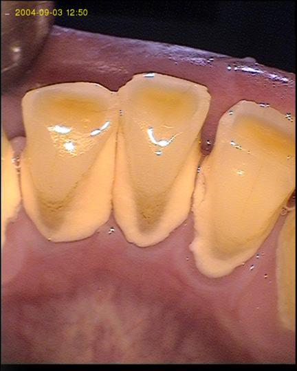 dental calculus